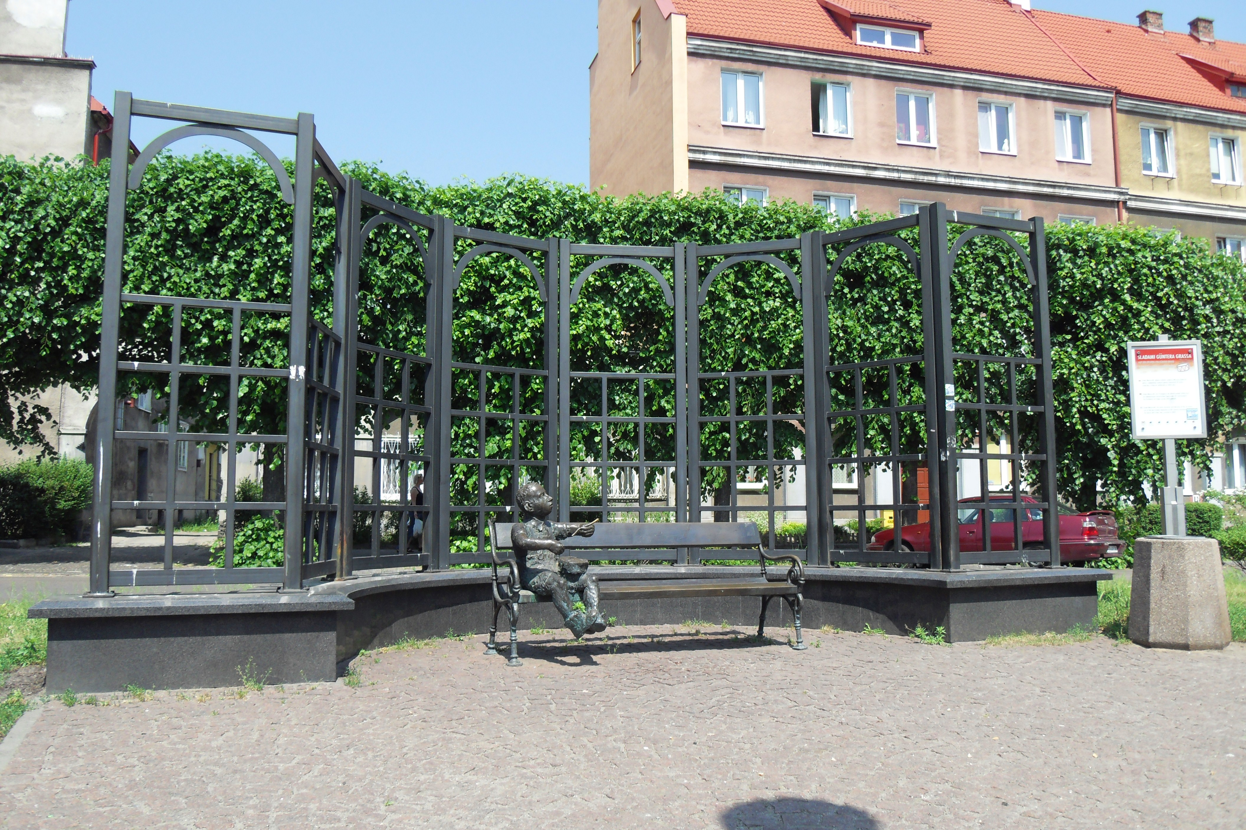 Gdańsk Wrzeszcz. Pomnik Oskara Matzeratha na placu Wybickiego.